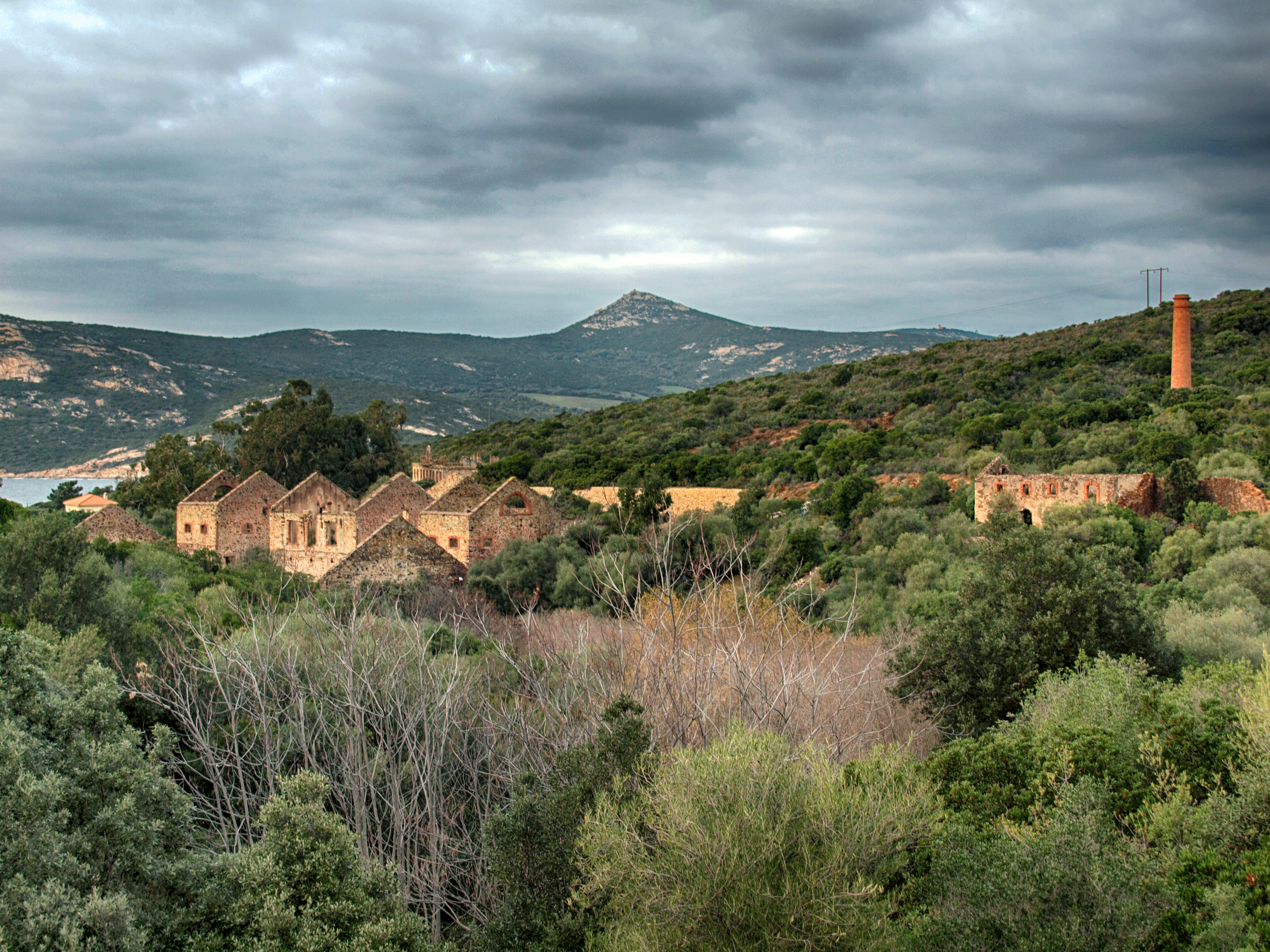 Calenzana, Balagne (Corse) - Site de l'exploitation minière de plomb argentifère et de cuivre abandonnée de l'Argentella.